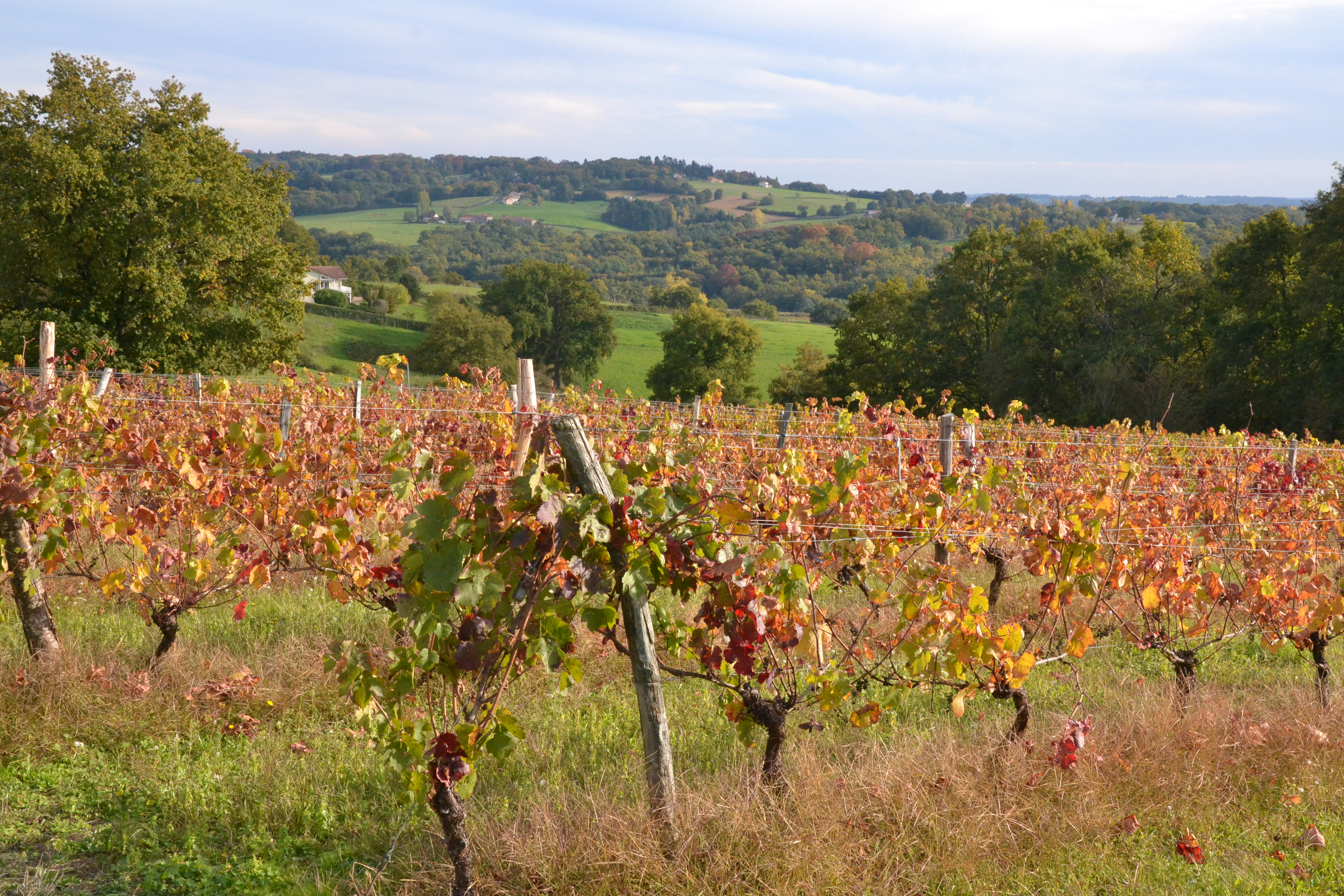 Vue du vignoble de Verneuil-sur-Vienne (Haute-Vienne, France)